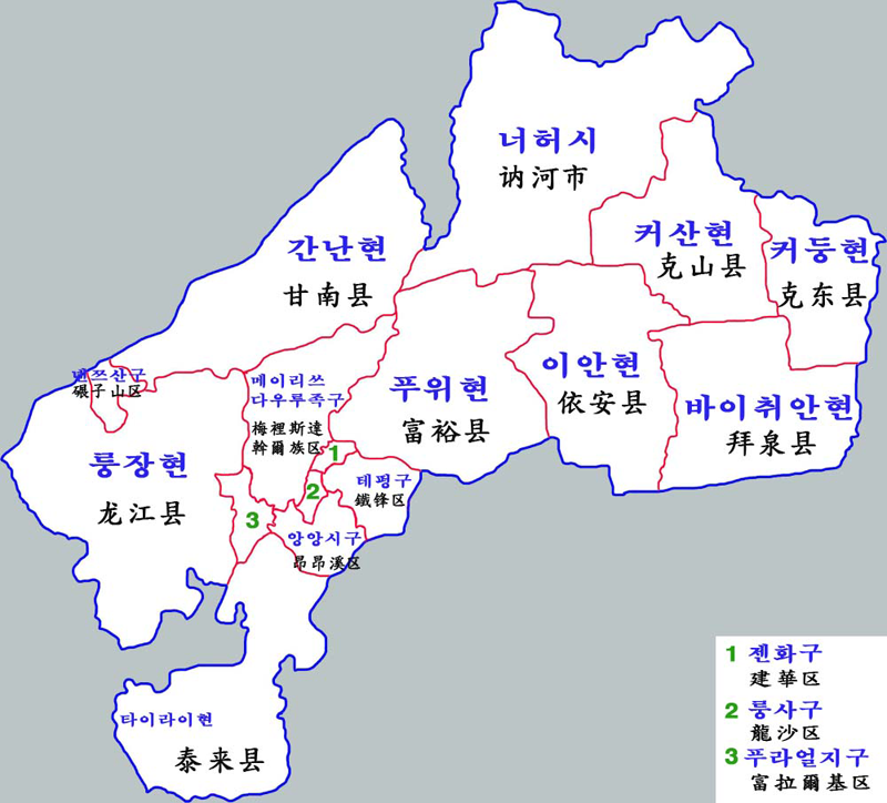 치치하얼시 현급구역도